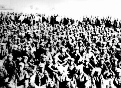 1936年10月，红西路军出征。图为准备渡河的红四方面军之一部